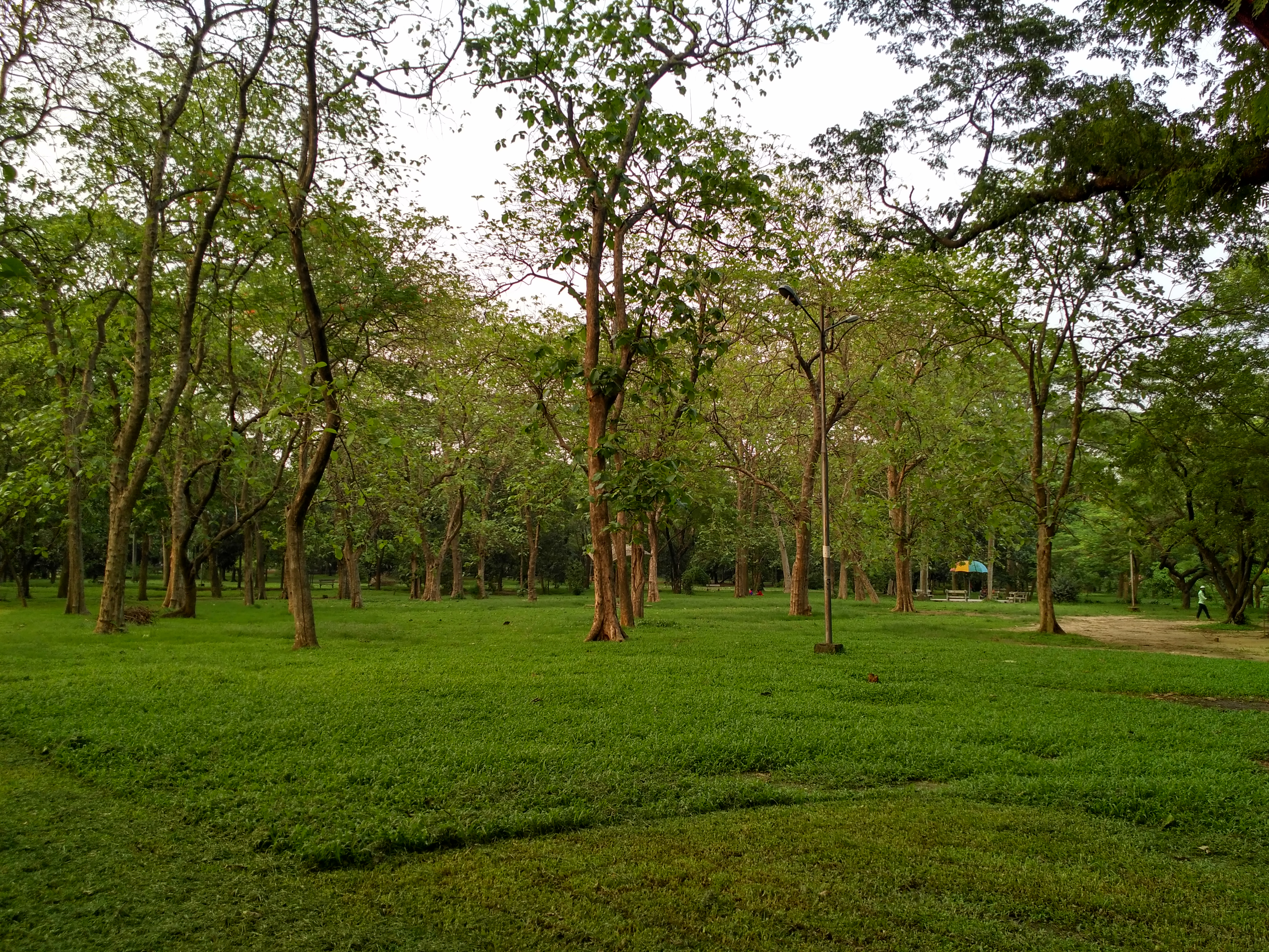 Teak trees in Ramna Park, Dhaka.